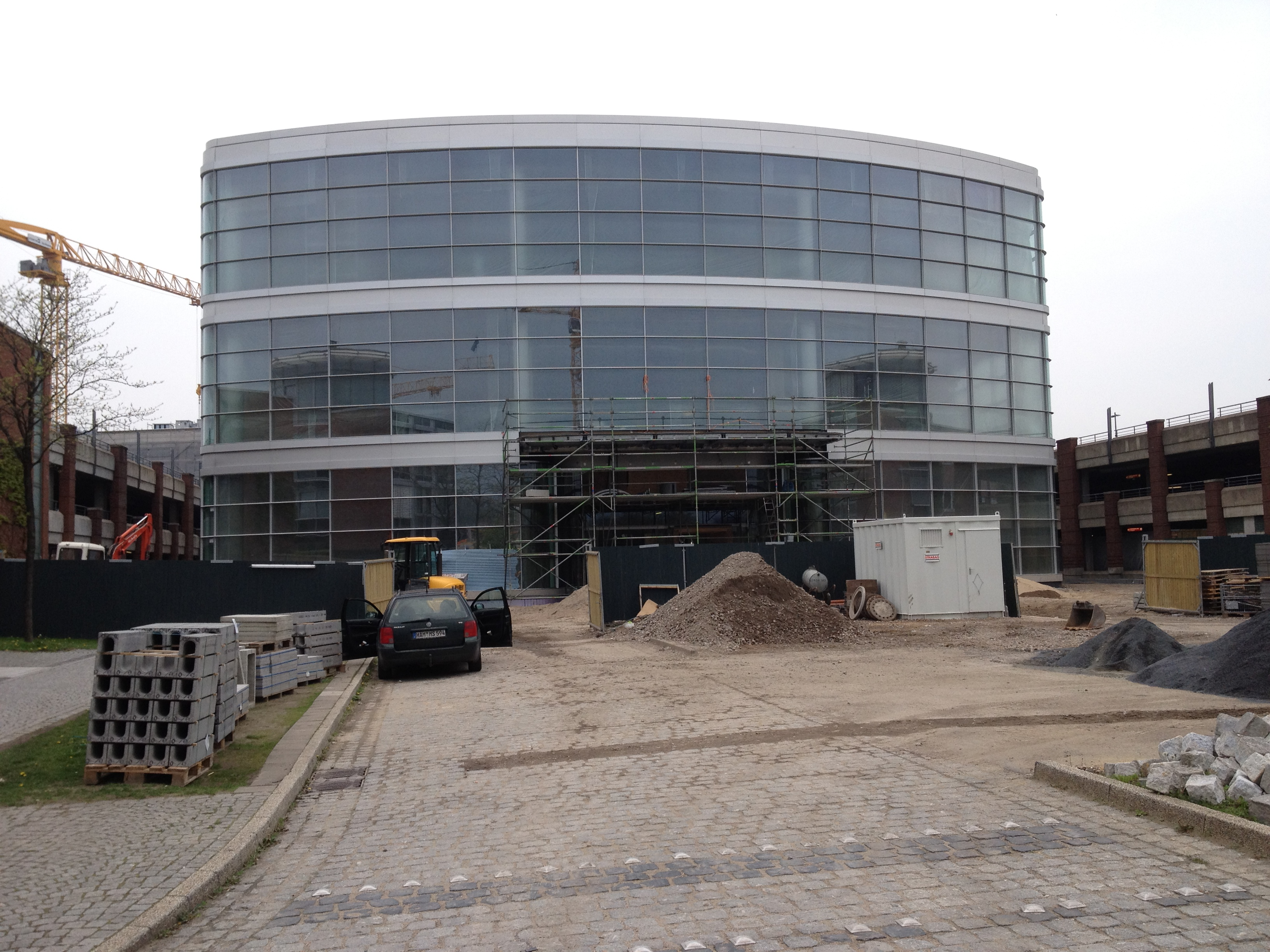 Die Erweiterung des Einkaufszentrums Centro im Bau; hier das dreigeschossige P&C